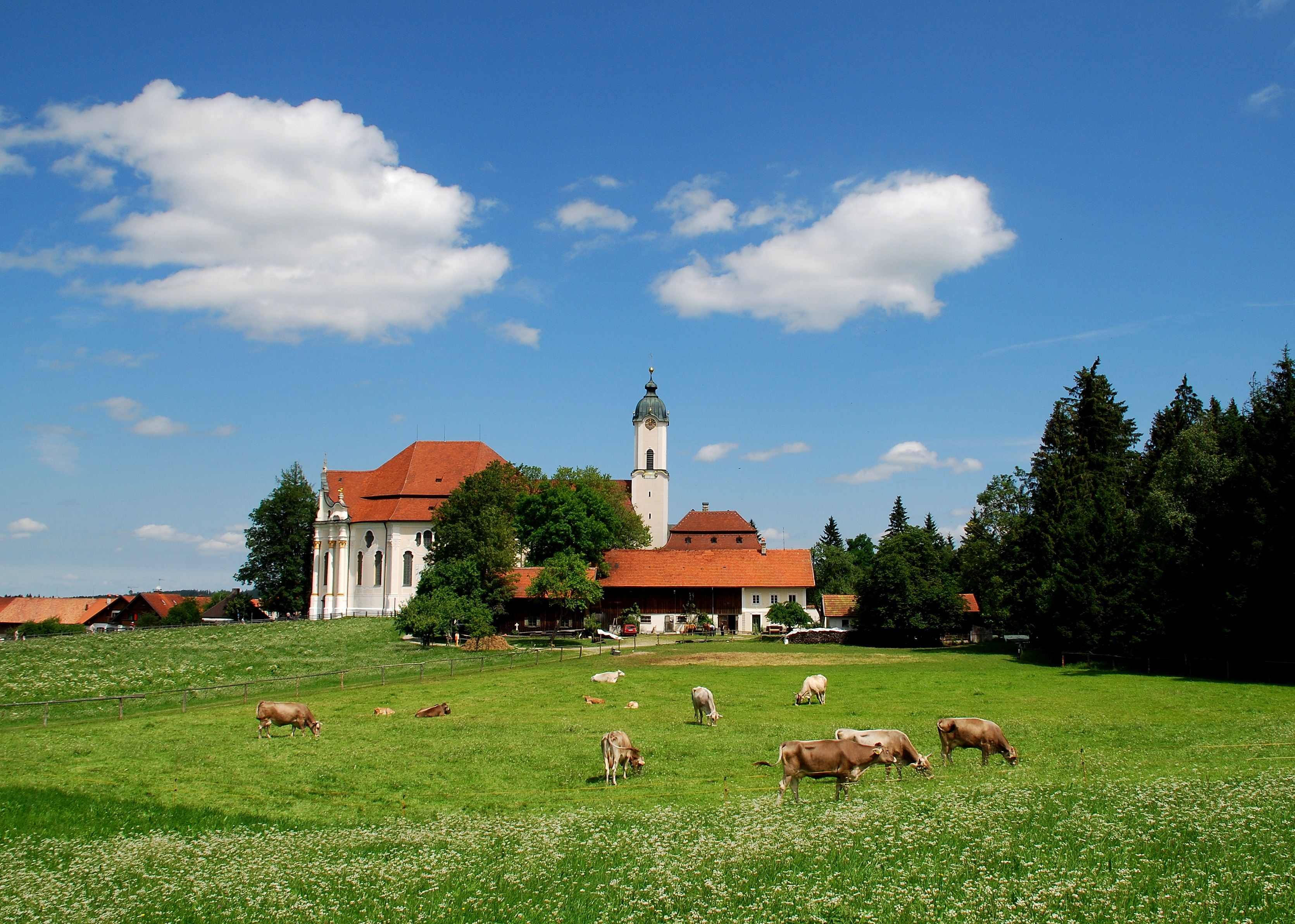 Steingaden, OT Wies. Wieskirche, Wallfahrtskirche zum Gegeißelten Heiland auf der Wies. UNESCO-Welterbe.